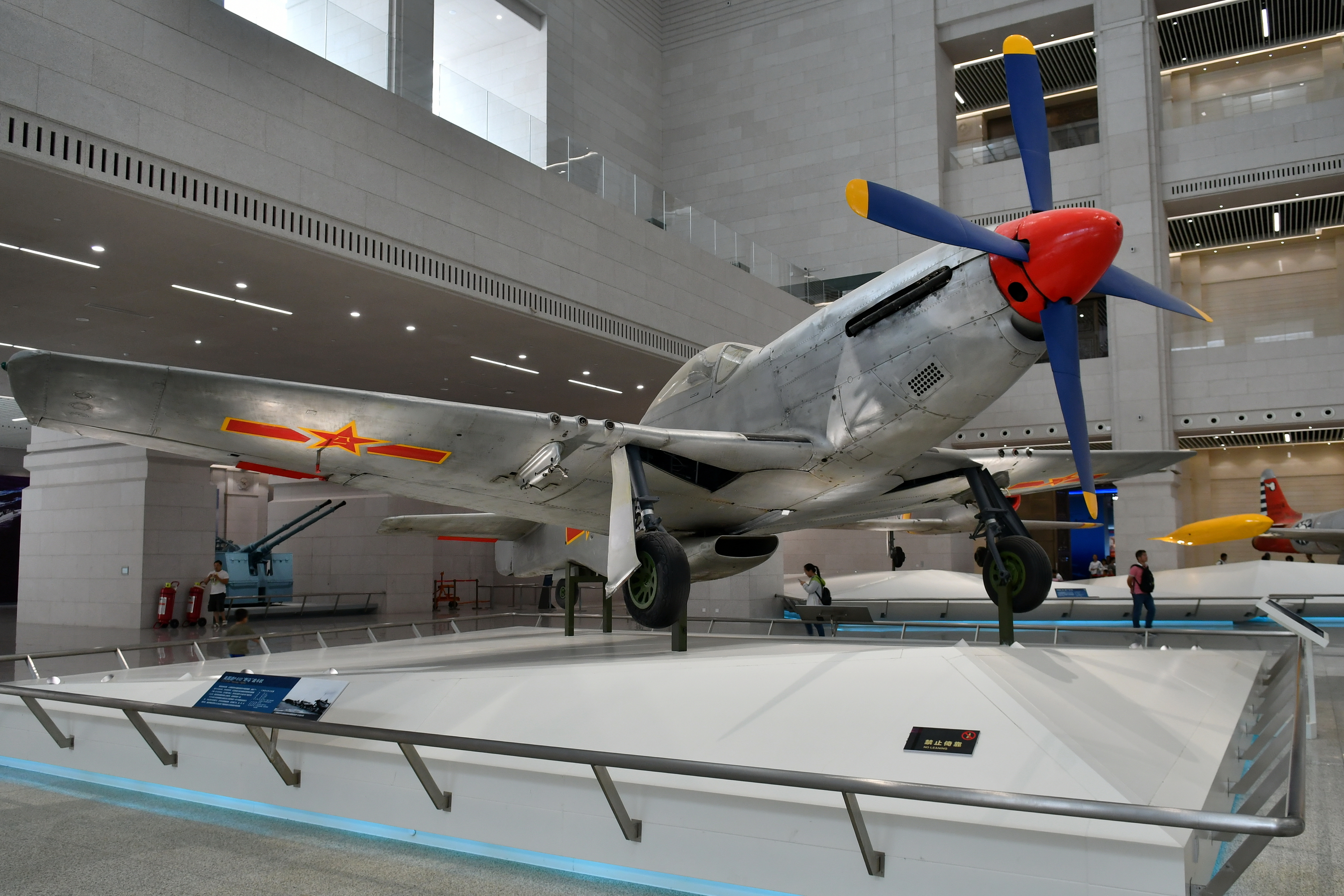 P-51D型“野马”战斗机，1949年10月1日参加中华人民共和国开国大典阅兵作为领队机。拍摄于中国人民革命军事博物馆。